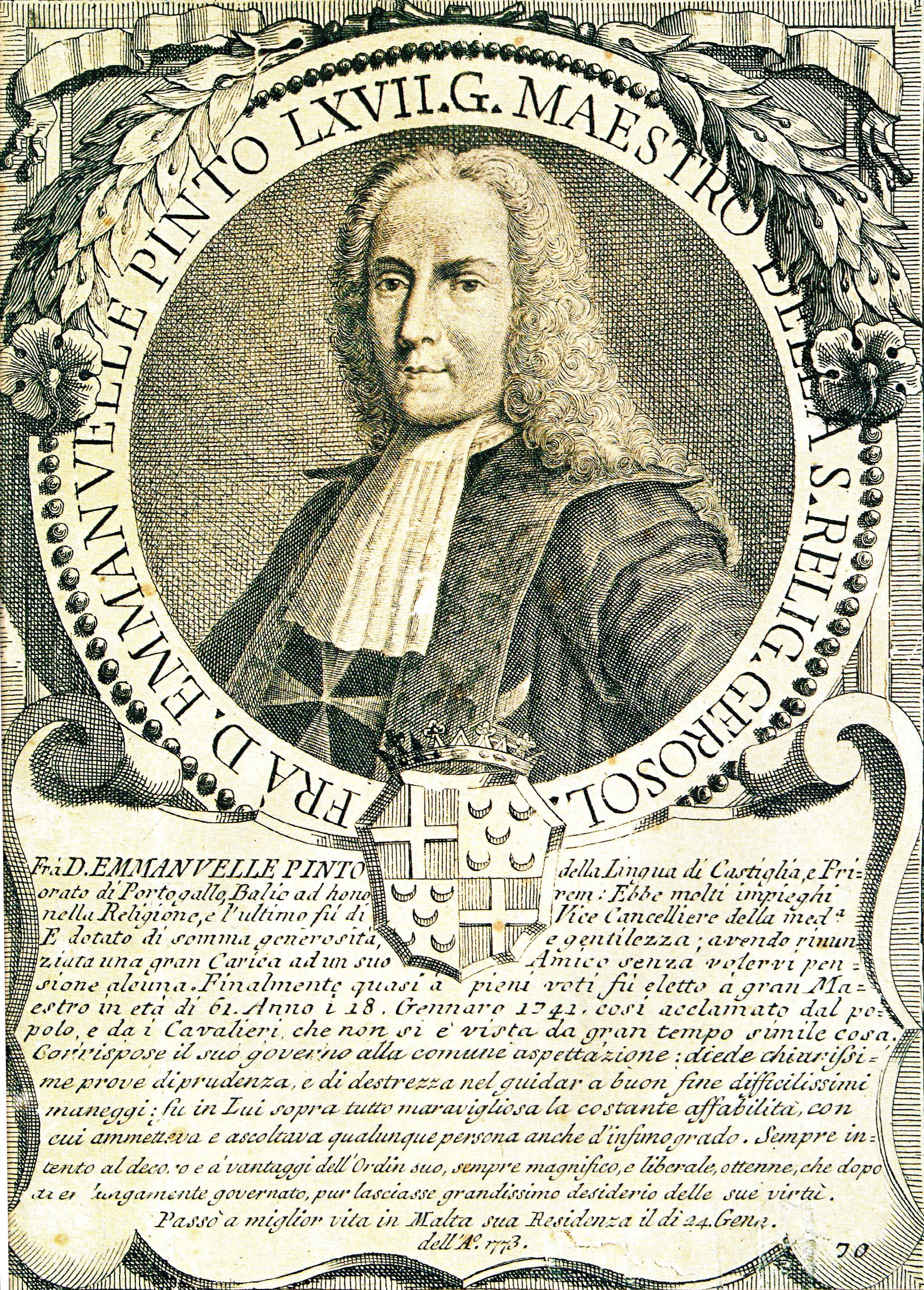 Emmanuelle Pinto